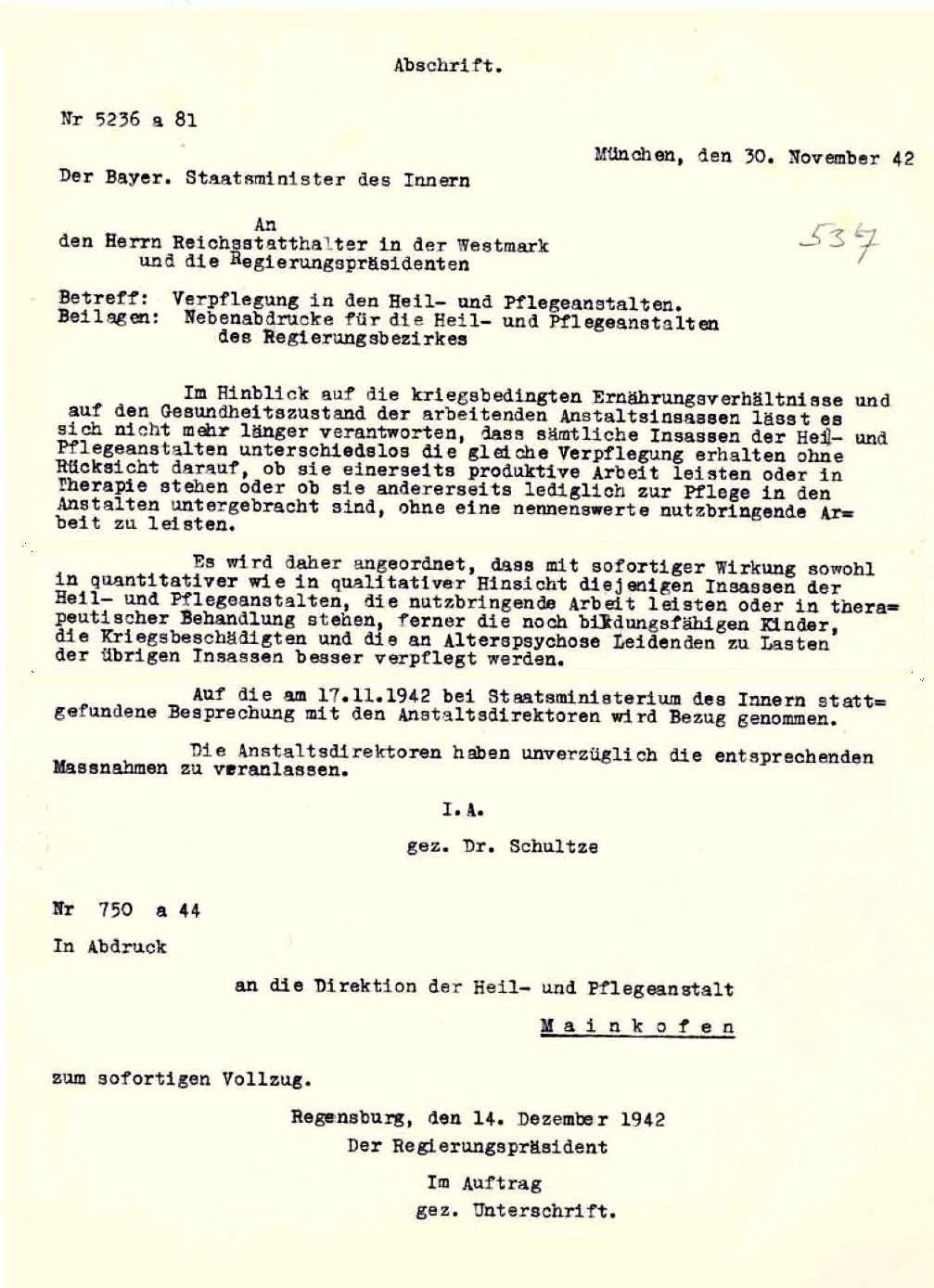 Der Hungerkost-Erlass des Bayerischen Innenministeriums vom 30. November 1942 führte zum Tod tausender Psychiatriepatienten in Bayern.